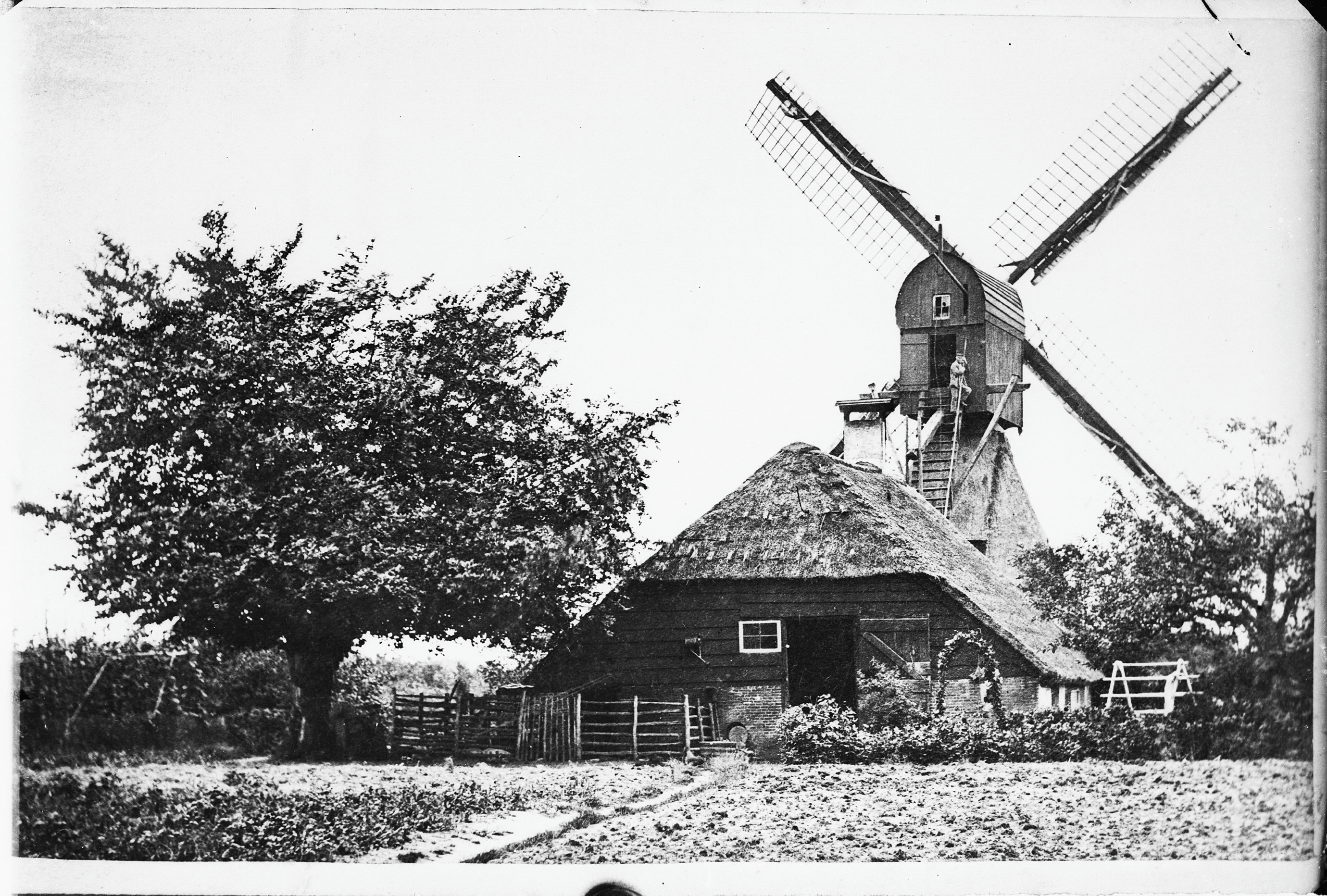 Molen van Bosch en Drakenstein: korenmolen, gesloopt in 1903